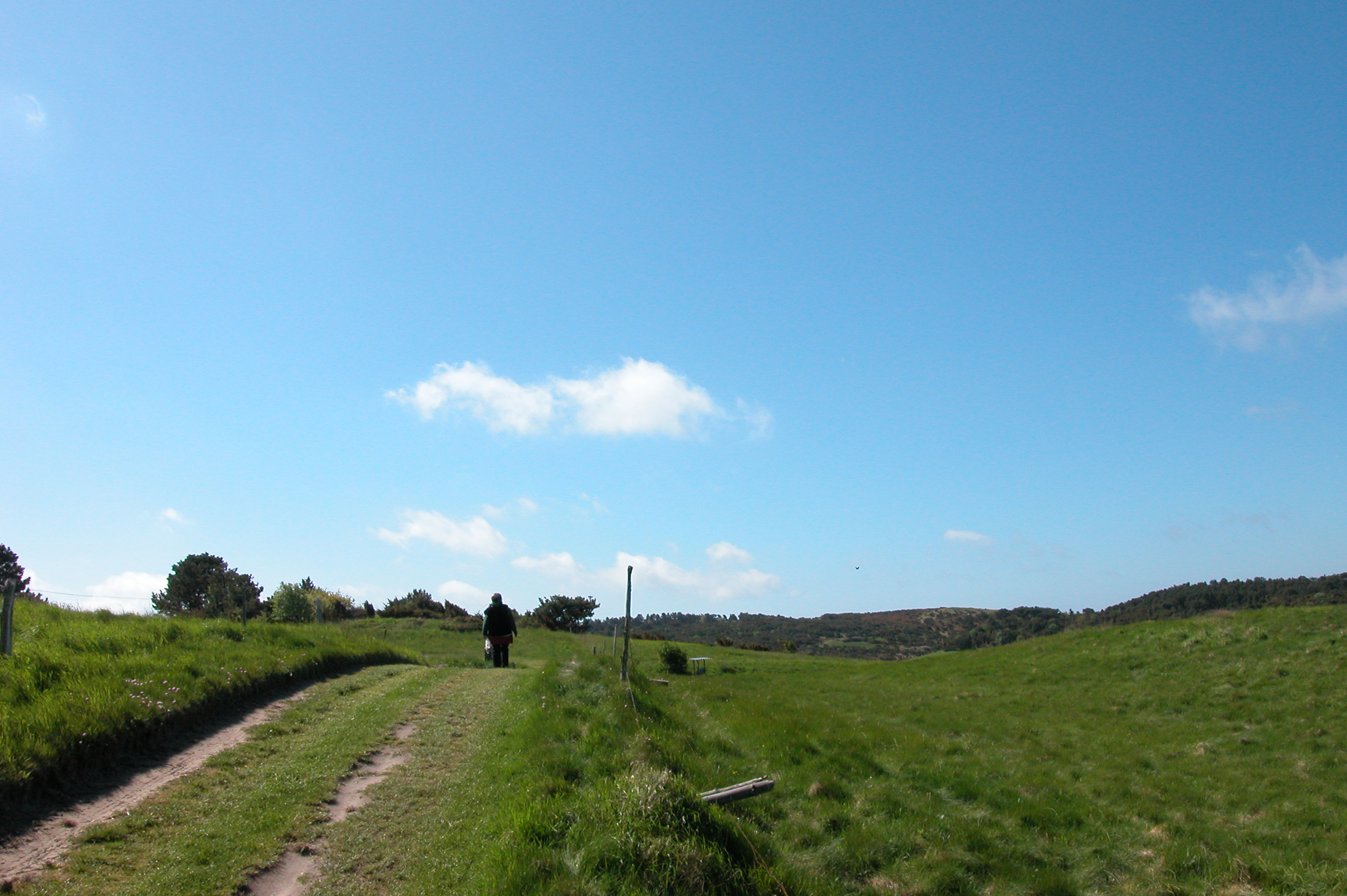 Insel Anholt/Ostsee, Dänemark, im Inland.